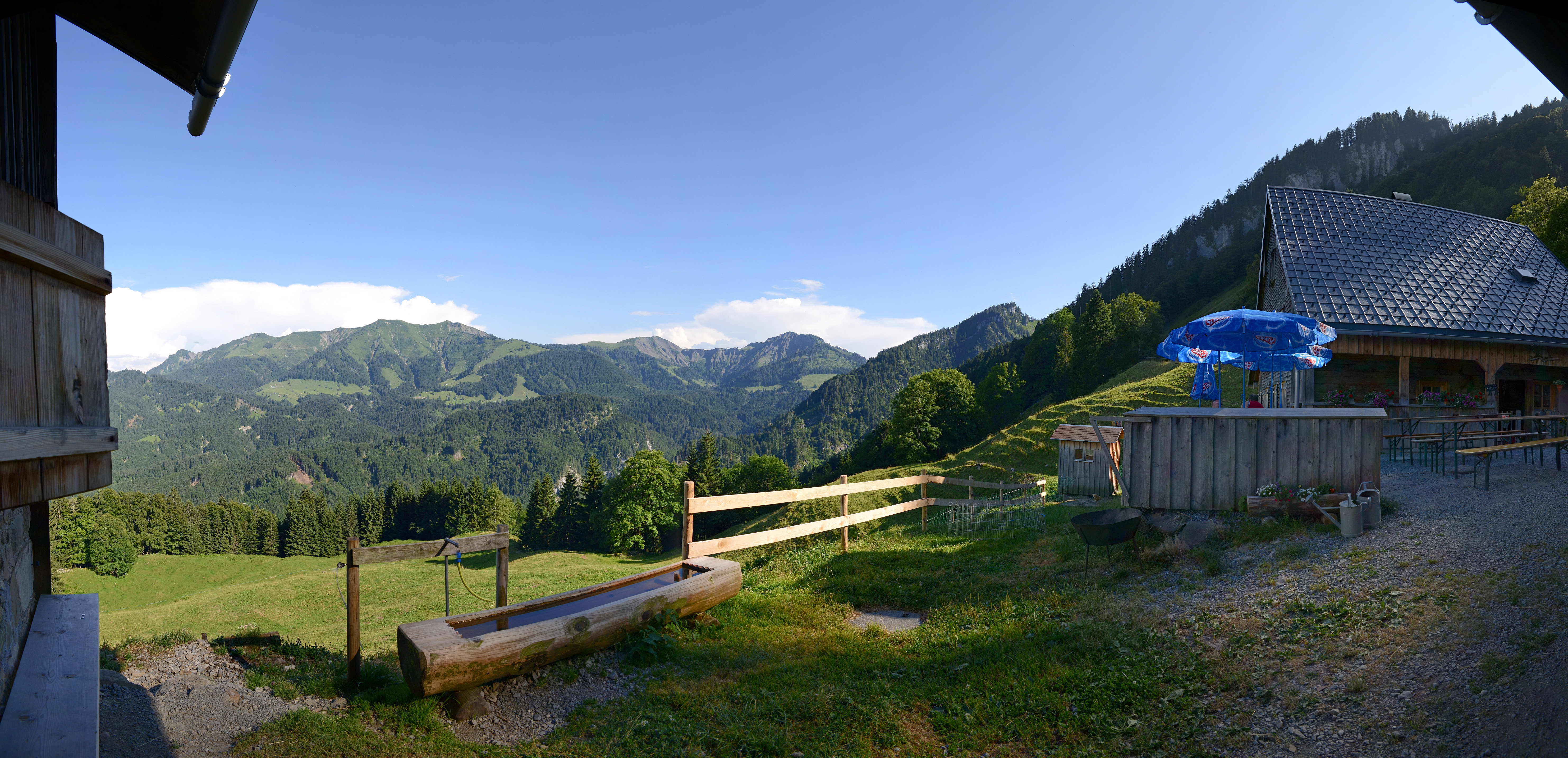 Auf 1.100 ü.A liegt südseitig unter dem Staufen die gleichnamige Alpe. Das Panorama zeigt den Dornbirner First mit der Mörzelspitze. Die Bergkette, ist an klaren Tagen noch von Friedrichshafen aus gut erkennbar. NOTE: This image is a panorama consisting of multiple frames that were merged or stitched in software. As a result, this image necessarily underwent some form of digital manipulation. These manipulations may include blending, blurring, cloning, and colour and perspective adjustments. As a result of these adjustments, the image content may be slightly different from reality at the points where multiple images were combined. This manipulation is often required due to lens, perspective, and parallax distortions.